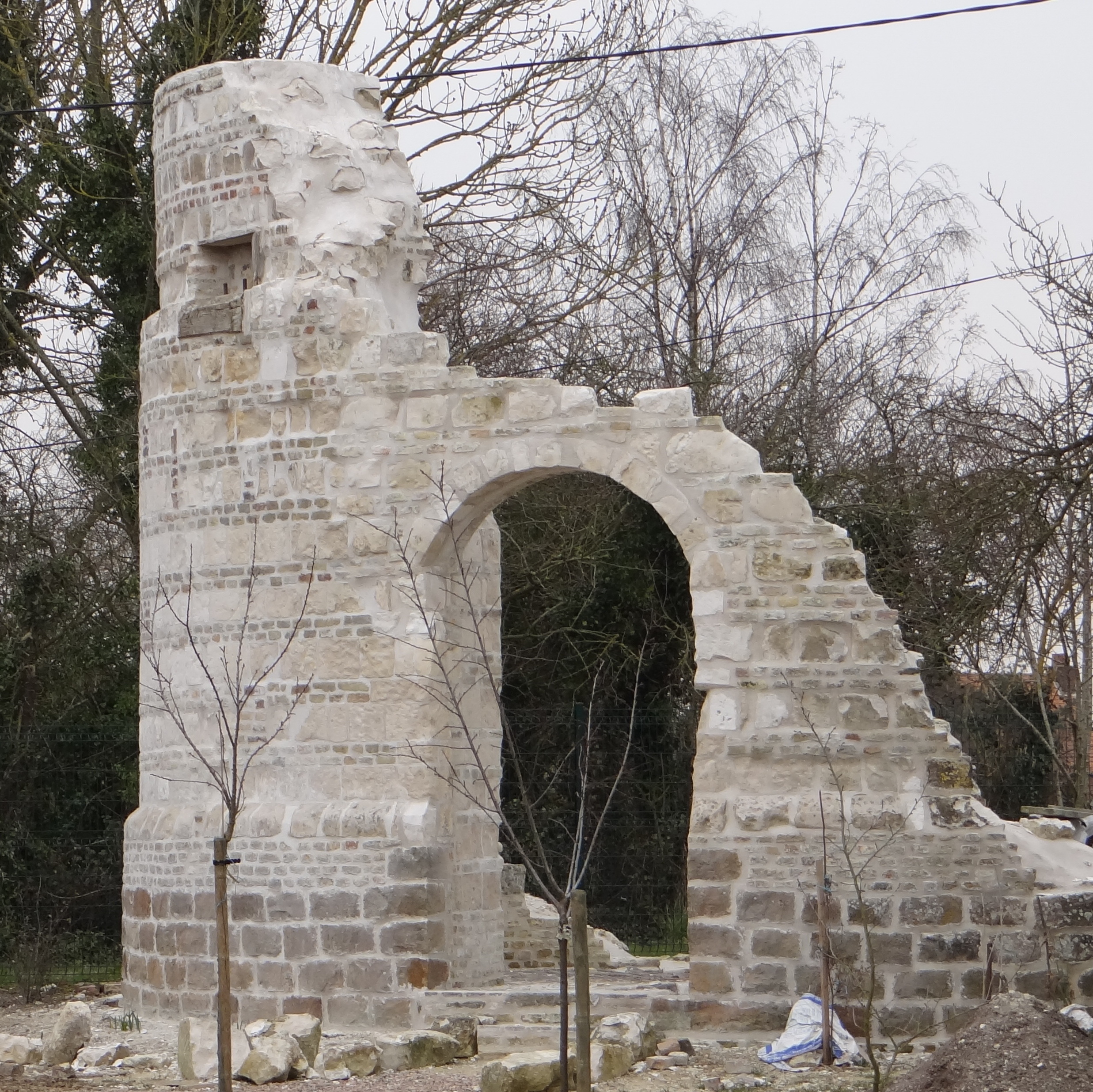 Ruine du Moulin d' Éperlecques